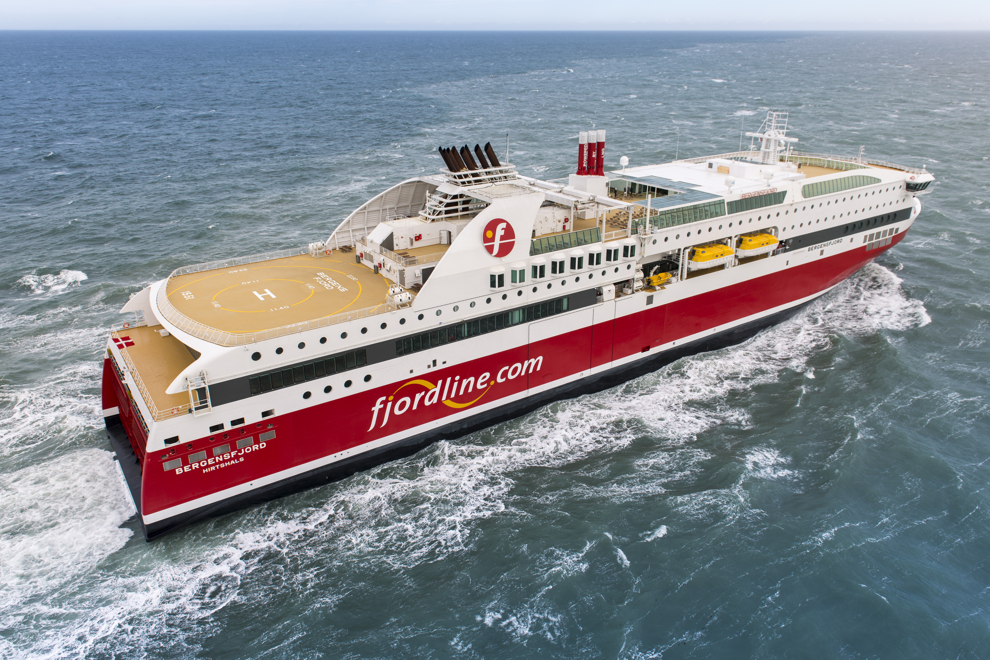 MS "Bergensfjord" taken on March 15, 2014